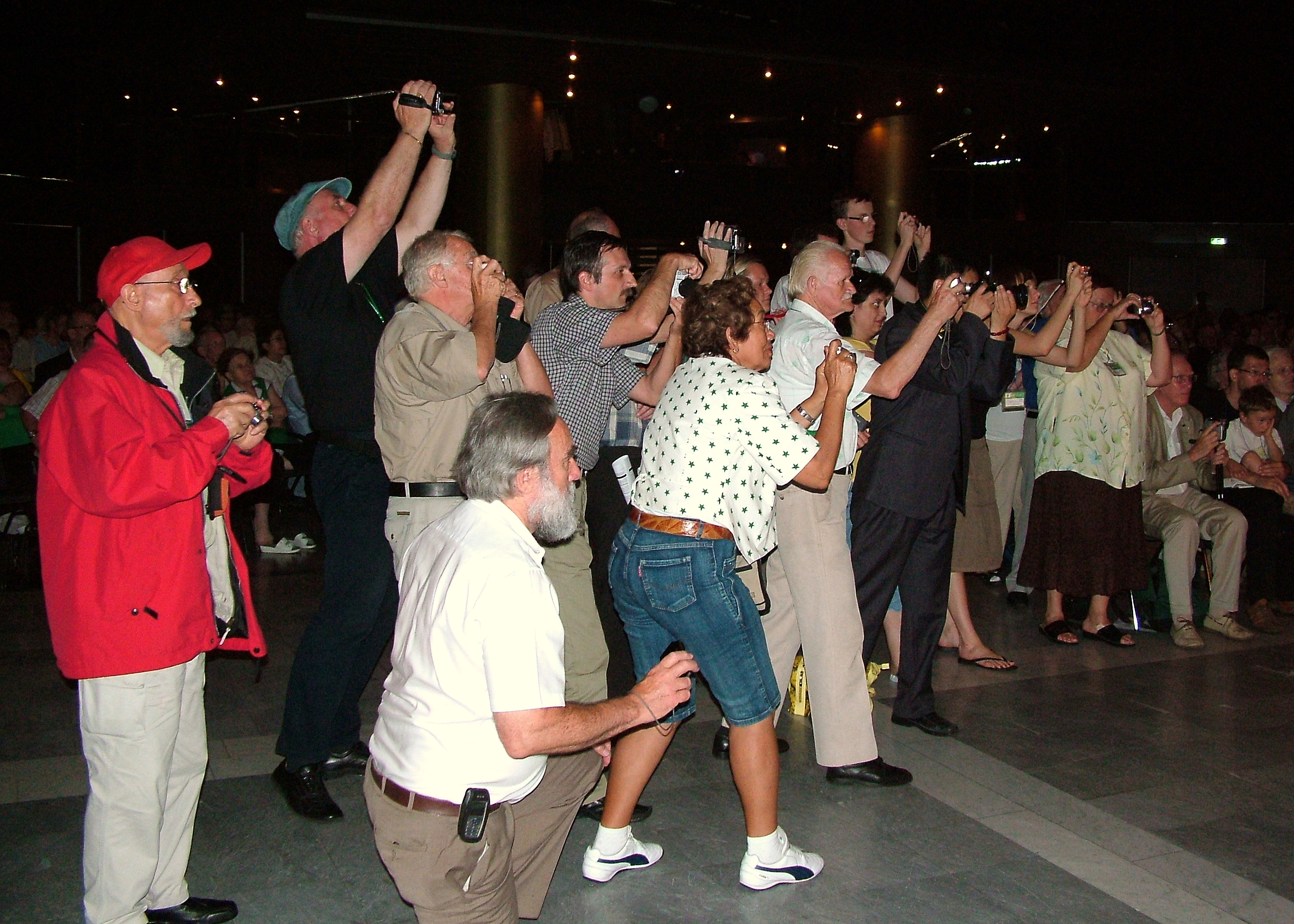 Universala Kongreso de Esperanto, Roterdamo 2008. Fermo.